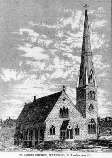 L'église Saint-Luke de Waterloo (Québec). Croquis paru dans l'édition du 17 juin 1871 du Canadian Illustrated News (vol. III, no 24, p. 372). L'artiste est inconnu